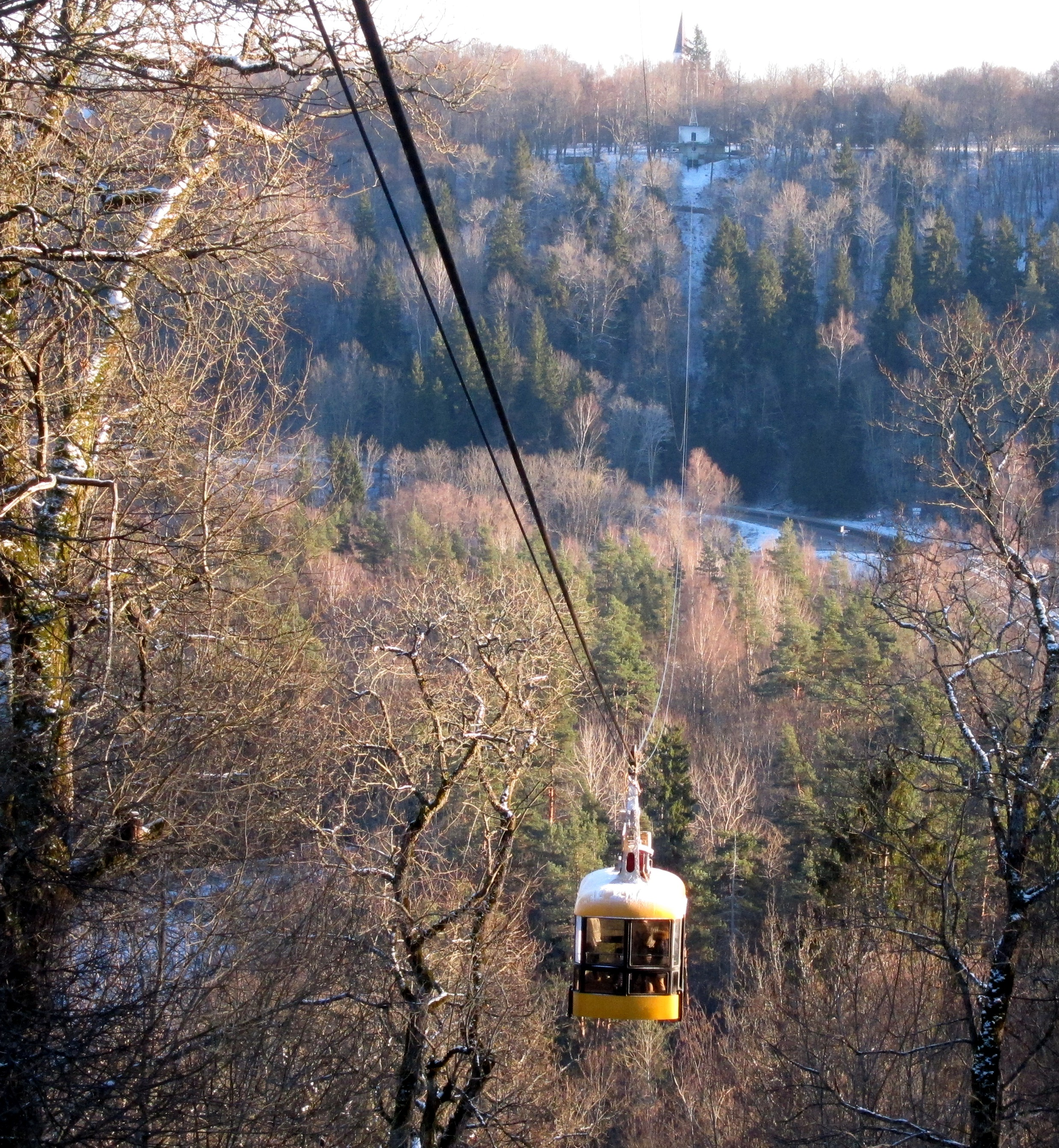 Siguldas trošu ceļš